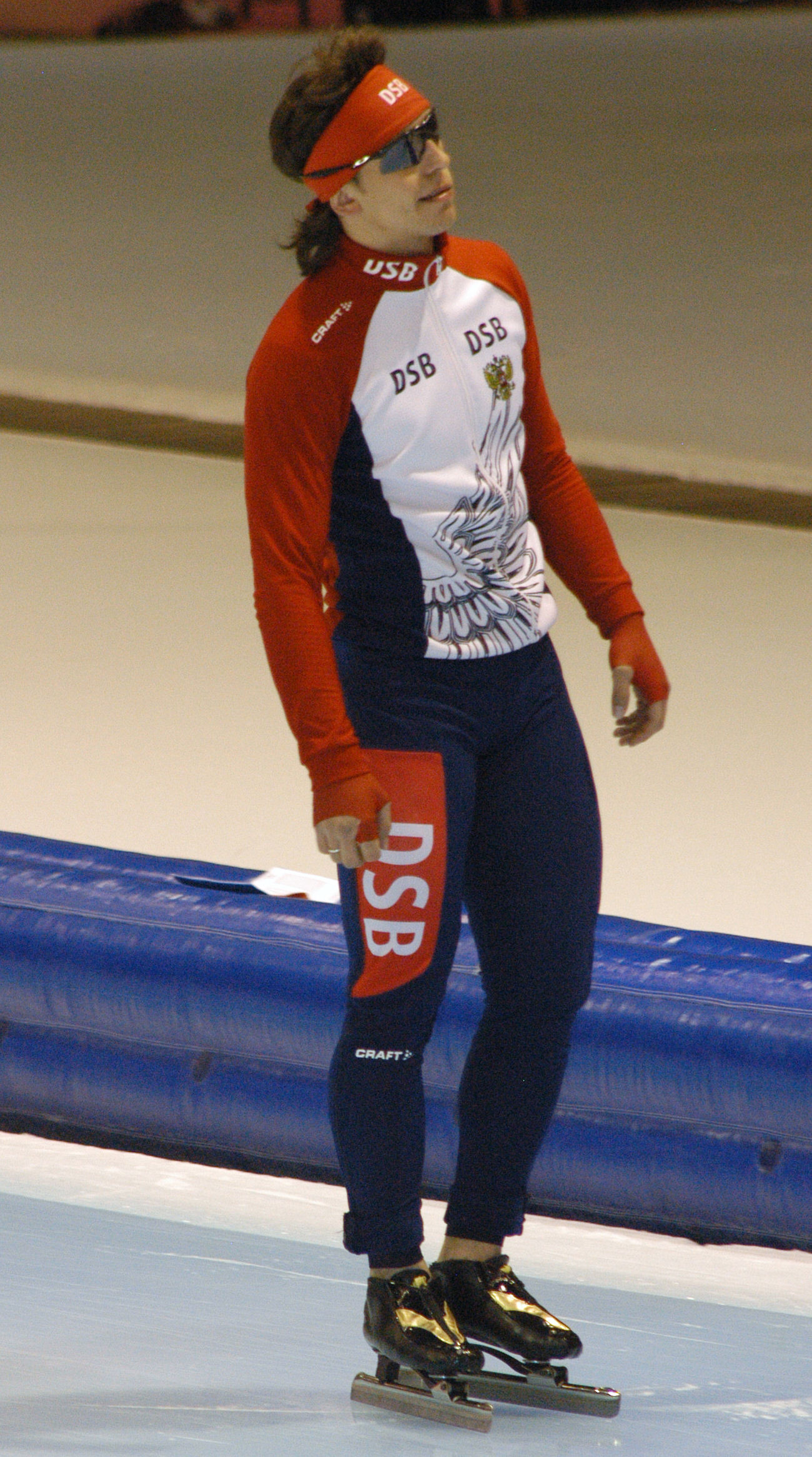 Dmitri Lobkov (RUS) at a world cup speedskating in Heerenveen, the Netherlands.